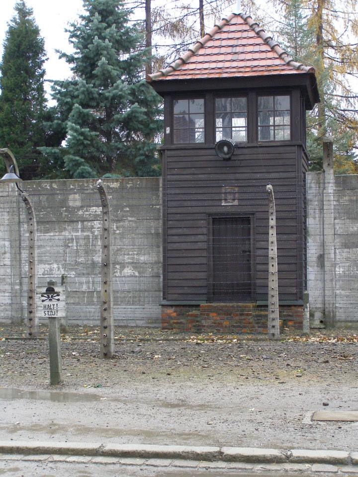 Strážní věž Auschwitz s cedulí